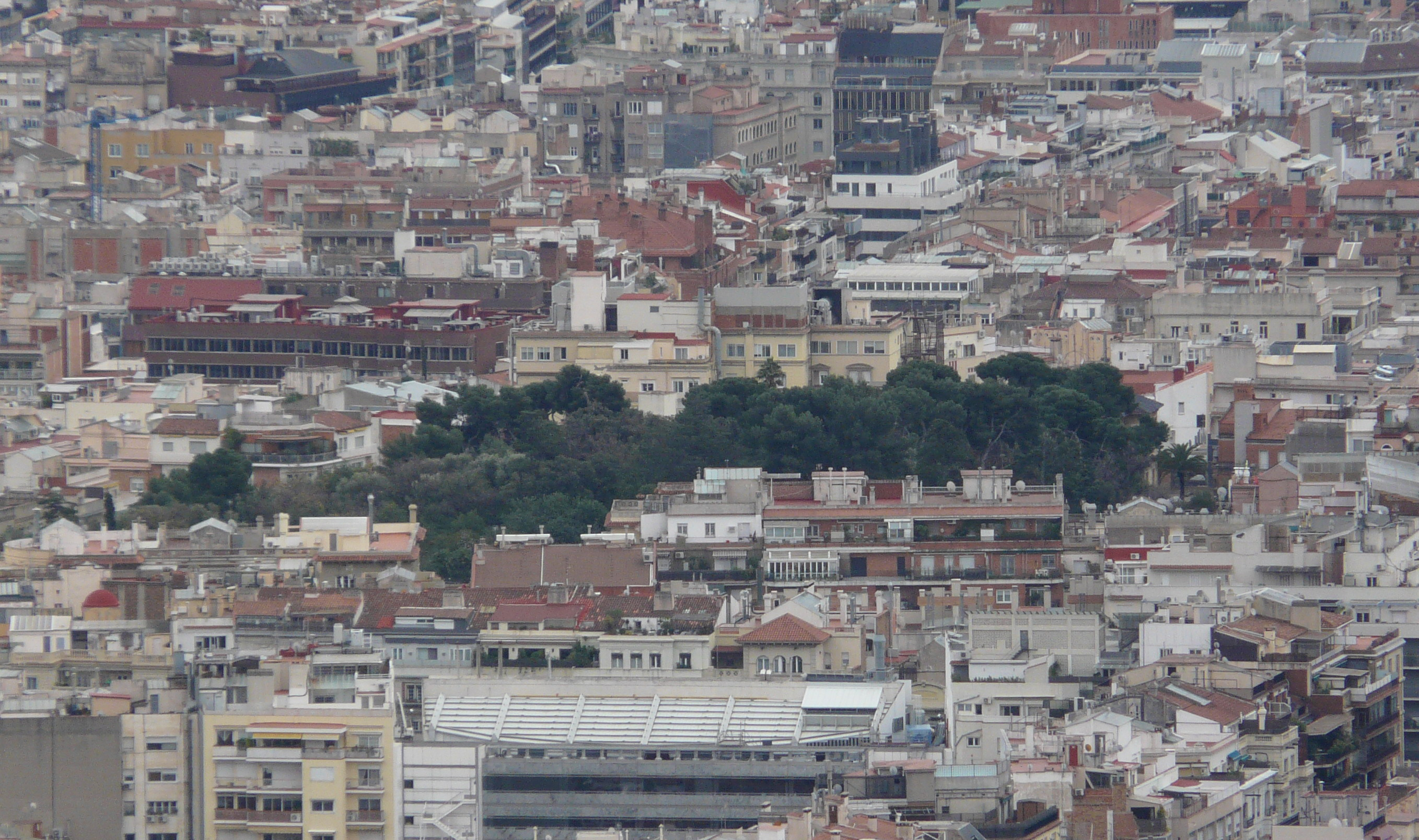 El turó de Monterols vist des de Collserola, de prop de Vallvidrera